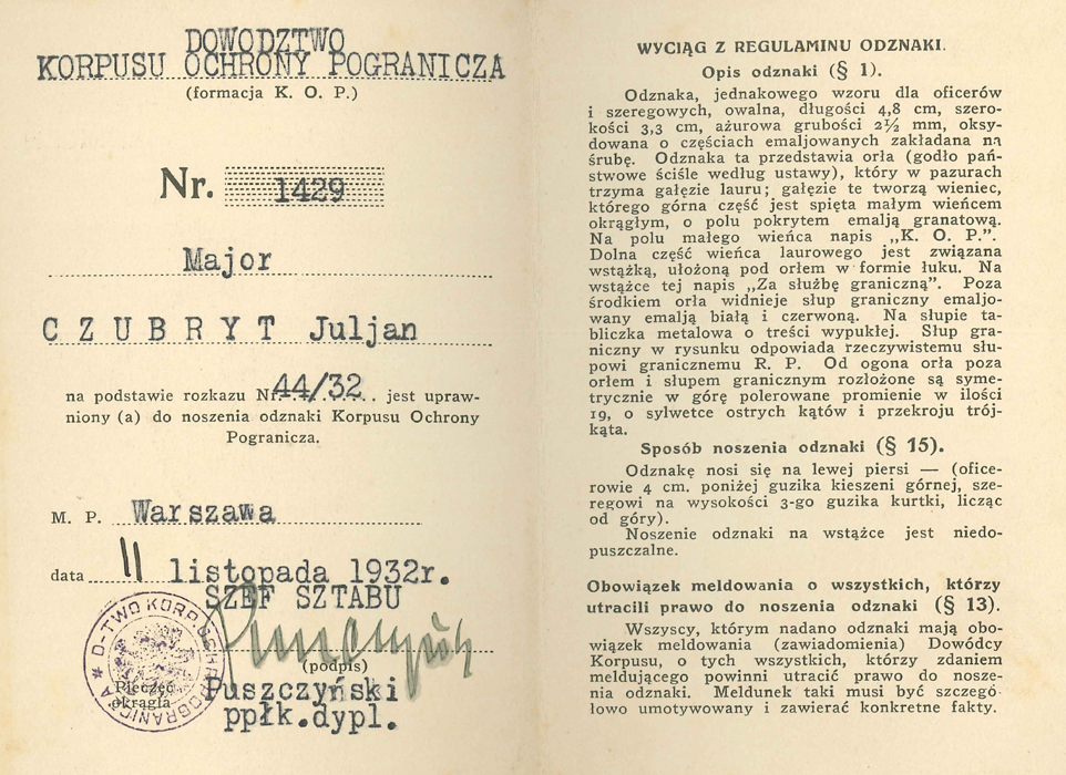 Legitymacja nadania odznaki KOP